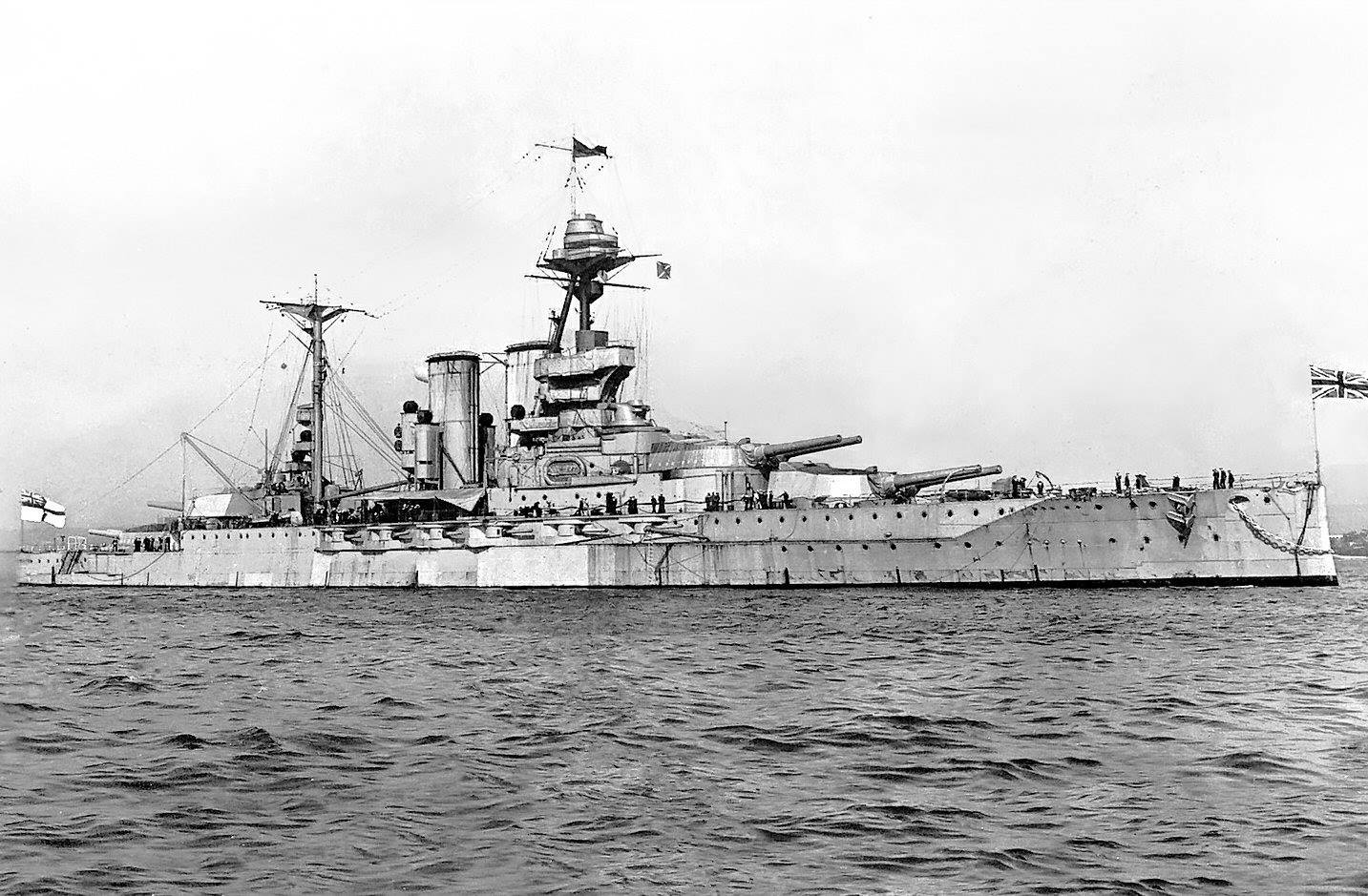 HMS Malaya 1919 - 1921